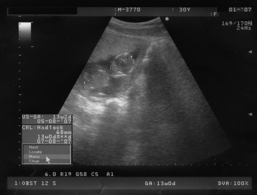 Ecografía (scan) de 13 semanas. Realizada externamente, por encima de la tripa. Se puede apreciar la cabeza y el cuerpo. El feto mide -sin contar las extremidades- 68mm y pesa aproximadamente 88 gramos.